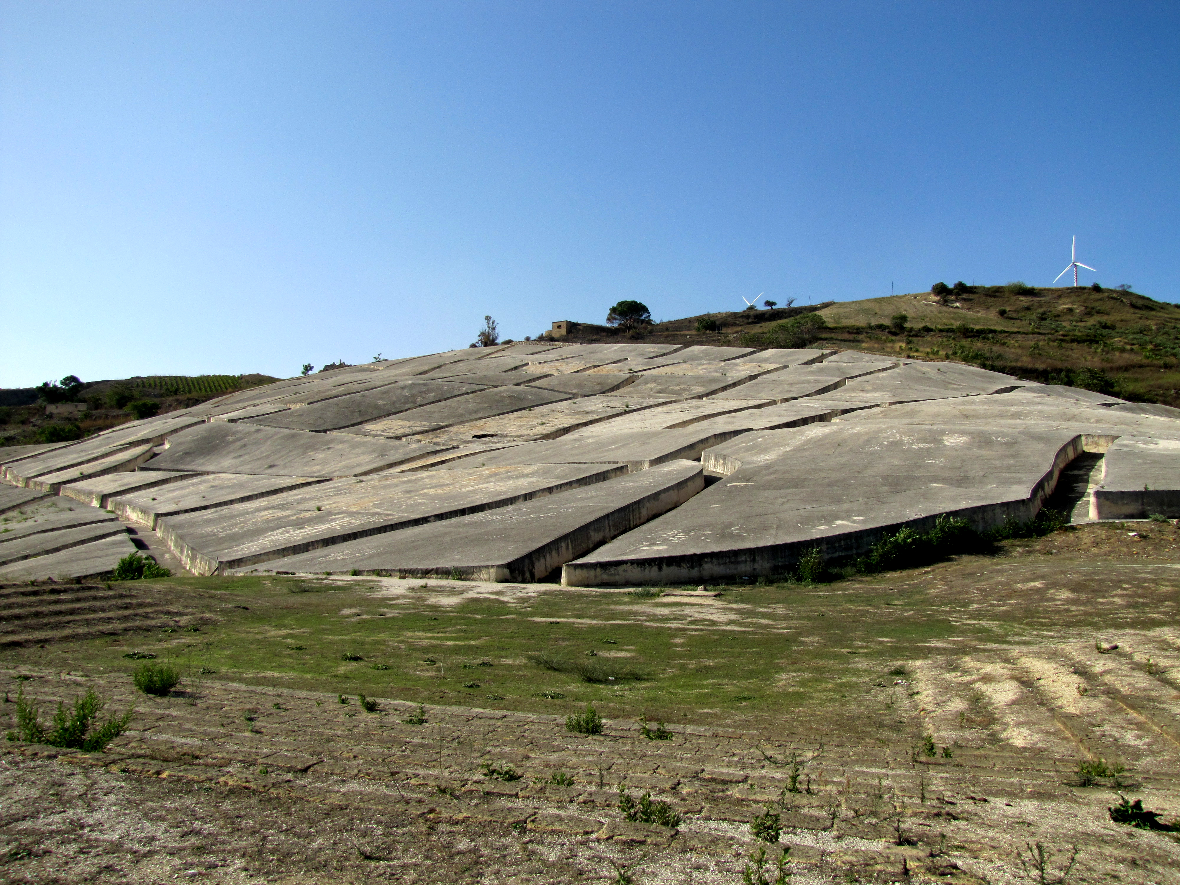 Foto del Cretto di Burri scattata a Gibellina Vecchia